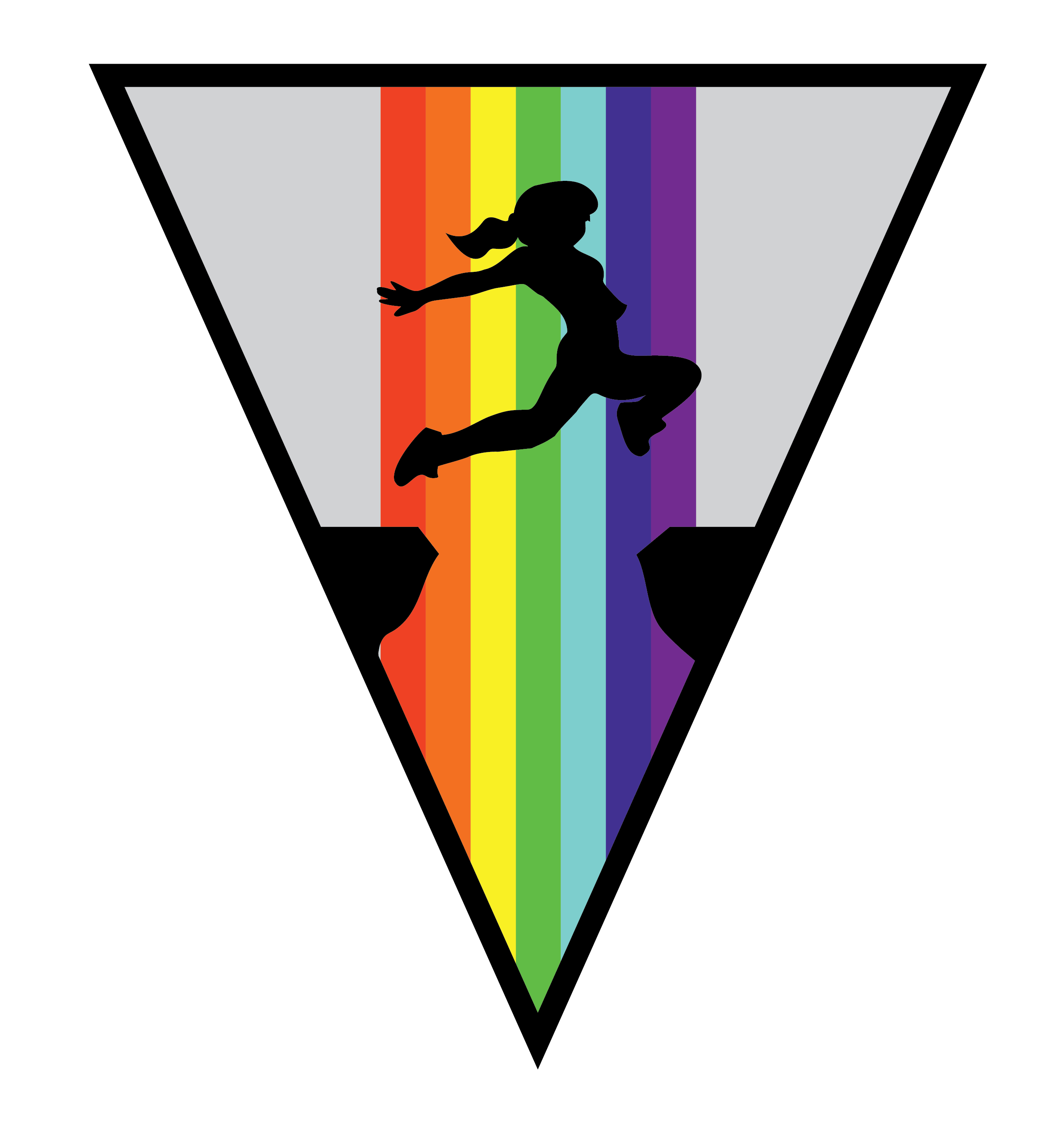 Шеврон пластунки, яка отримала ступінь Бунтарки - сірий трикутник з веселкою, посередині якого розташована дівчина, яка перестрибує прірву.